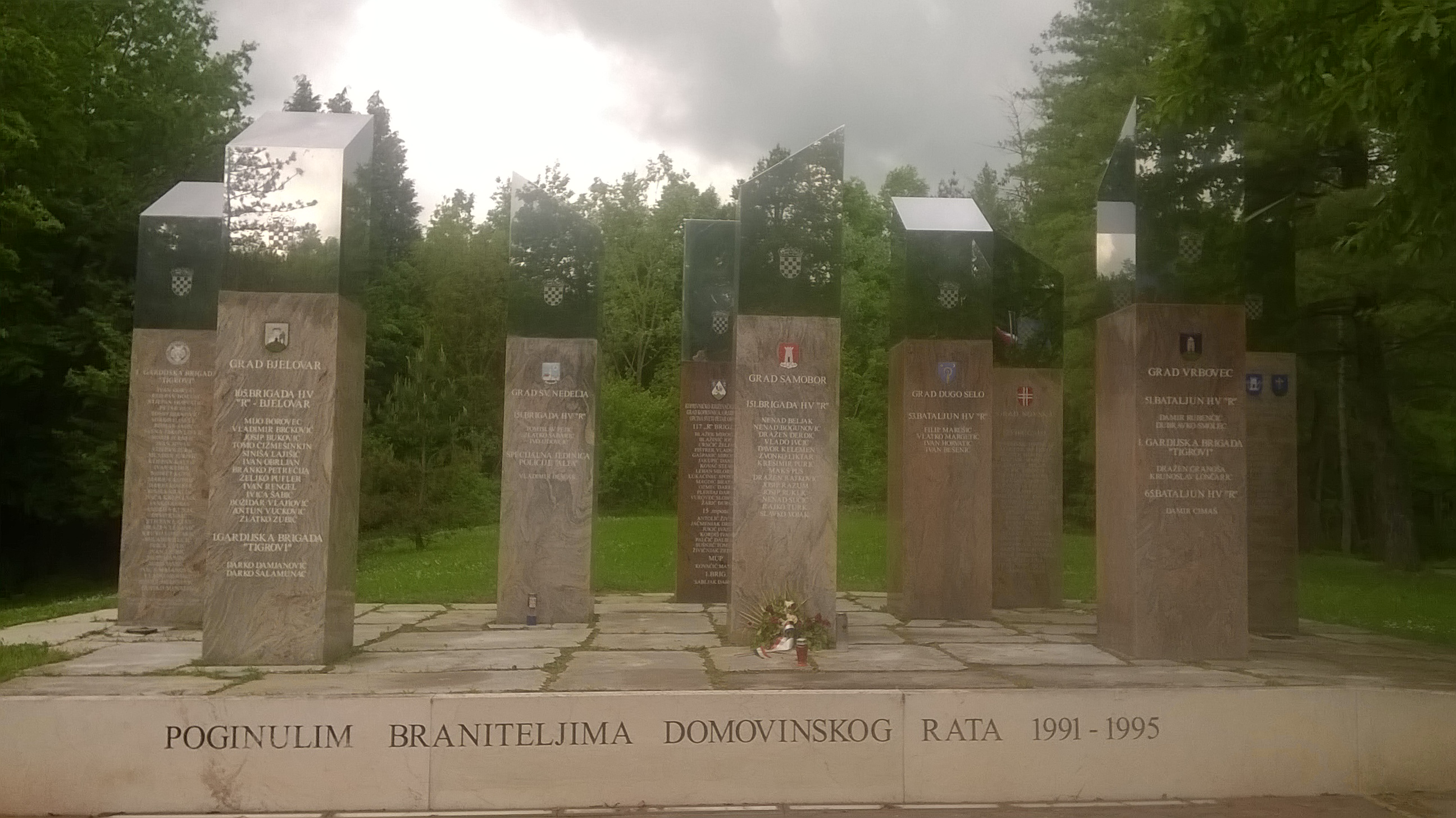 Denkmal für gefallene kroatische Verteidiger